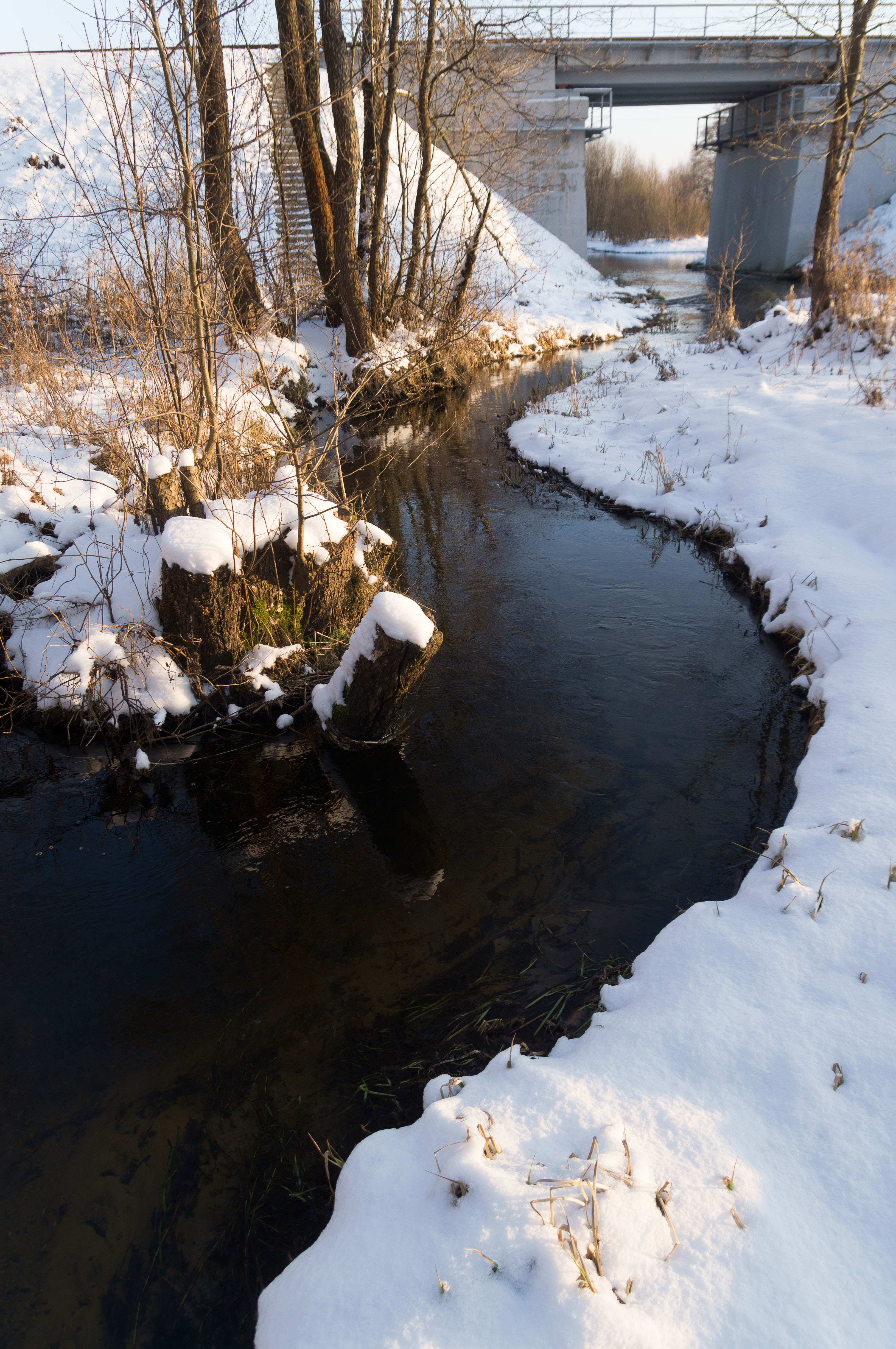 рака Пела